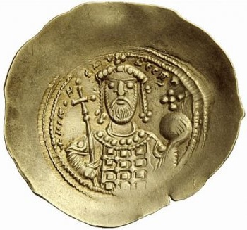 Histamenon of Nikephoros III. Botaneiates